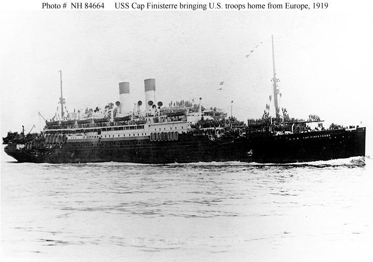 Die Cap Finisterre der HDSG als US-Truppentransporter